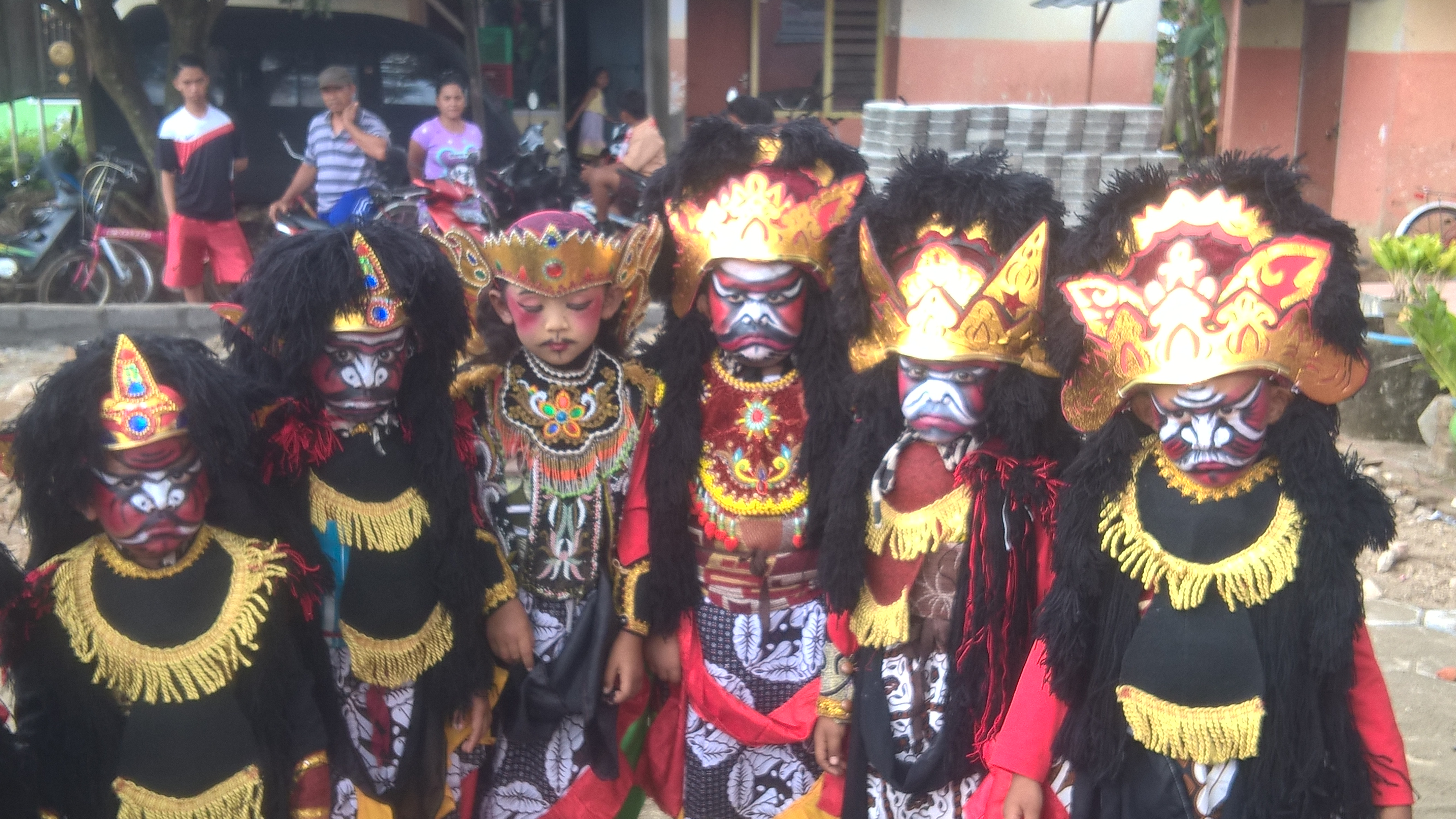 Pelajar Taman Kanak-kanan berfoto bersama sebelum menari jaranan This photo has been taken in the country: Indonesia